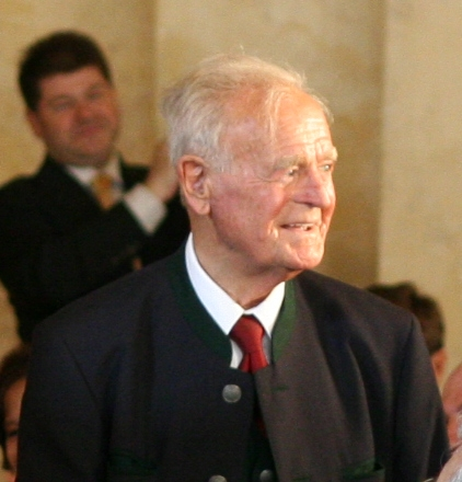 Beschreibung: Andreas Maurer bei der Feier 60 Jahre ÖVP-NÖ in Wien Quelle: Canon EOS 350D Ersteller: von Thomas Steiner am 22.6.2005 im Palais Niederösterreich in der Herrengasse in Wien fotografiert